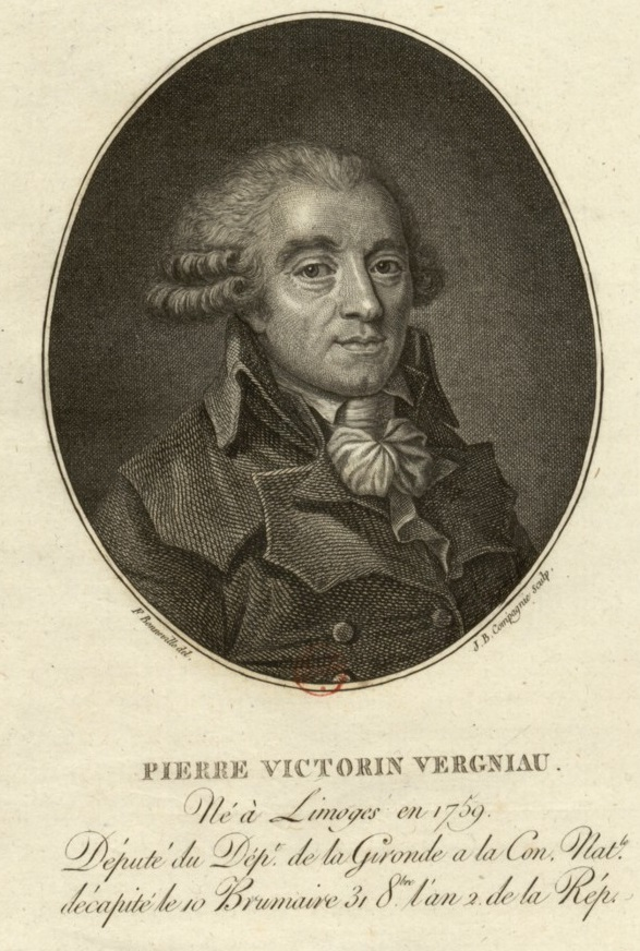 Pierre Victorin Vergniau né à Limoges en 1759, député du département de la Gironde a la Convention nationale, estampe.